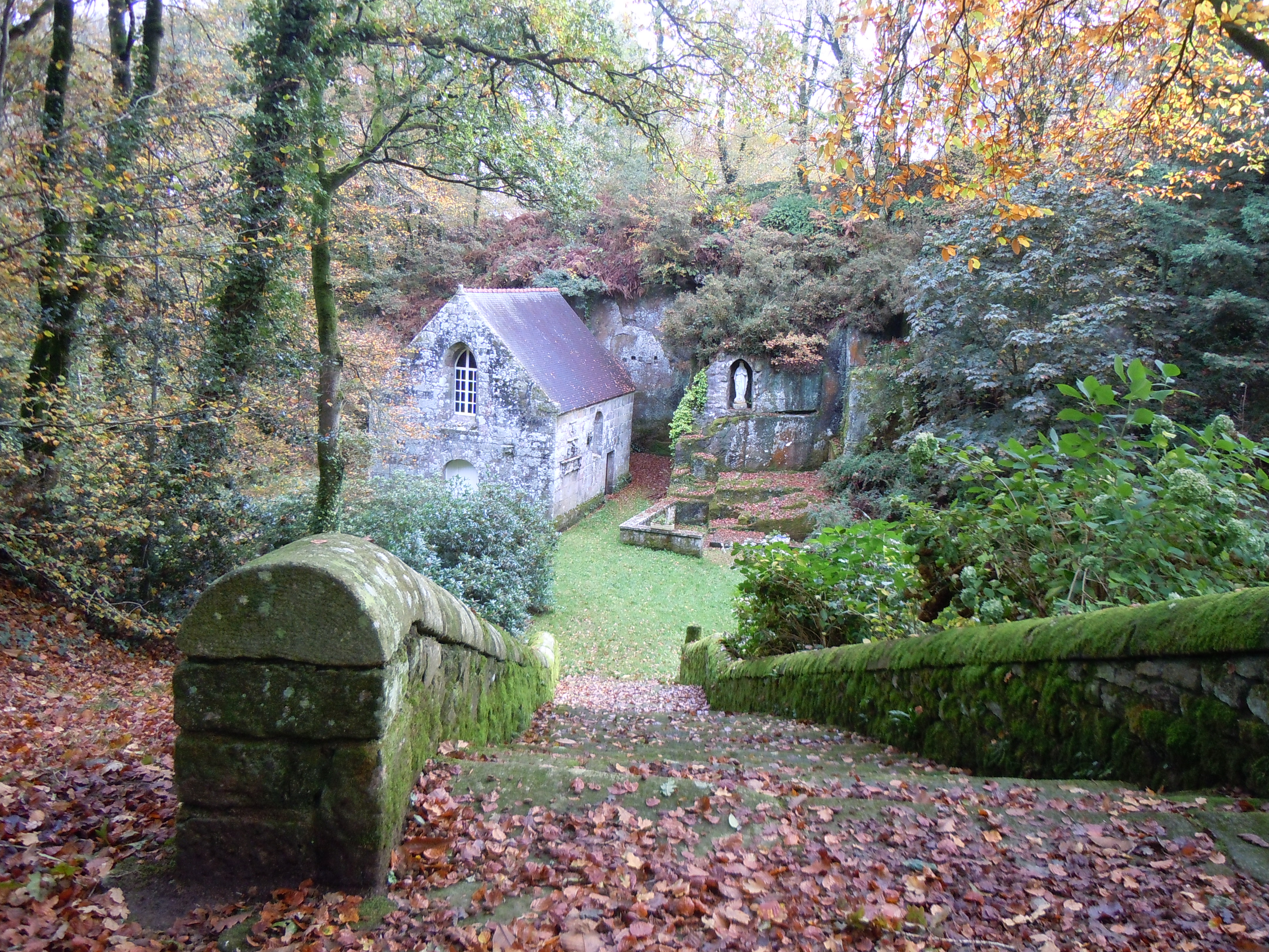 chapelle Notre-dame de la Fosse, construite dans une ancienne carrière de granite qui fut exploitée dès l'Antiquité (commune de Ploërdut et département du Morbihan)